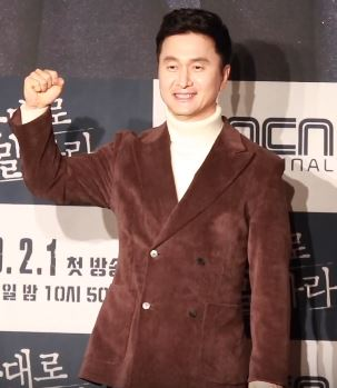 29일 오후 서울시 영등포구 여의도동 콘래드 서울 호텔에서 OCN 새 토일 오리지널 ‘본 대로 말하라’의 제작발표회가 열려 배우 장혁, 최수영, 진서연, 장현성,류승수가 참석해 포토타임을 갖고 있다.